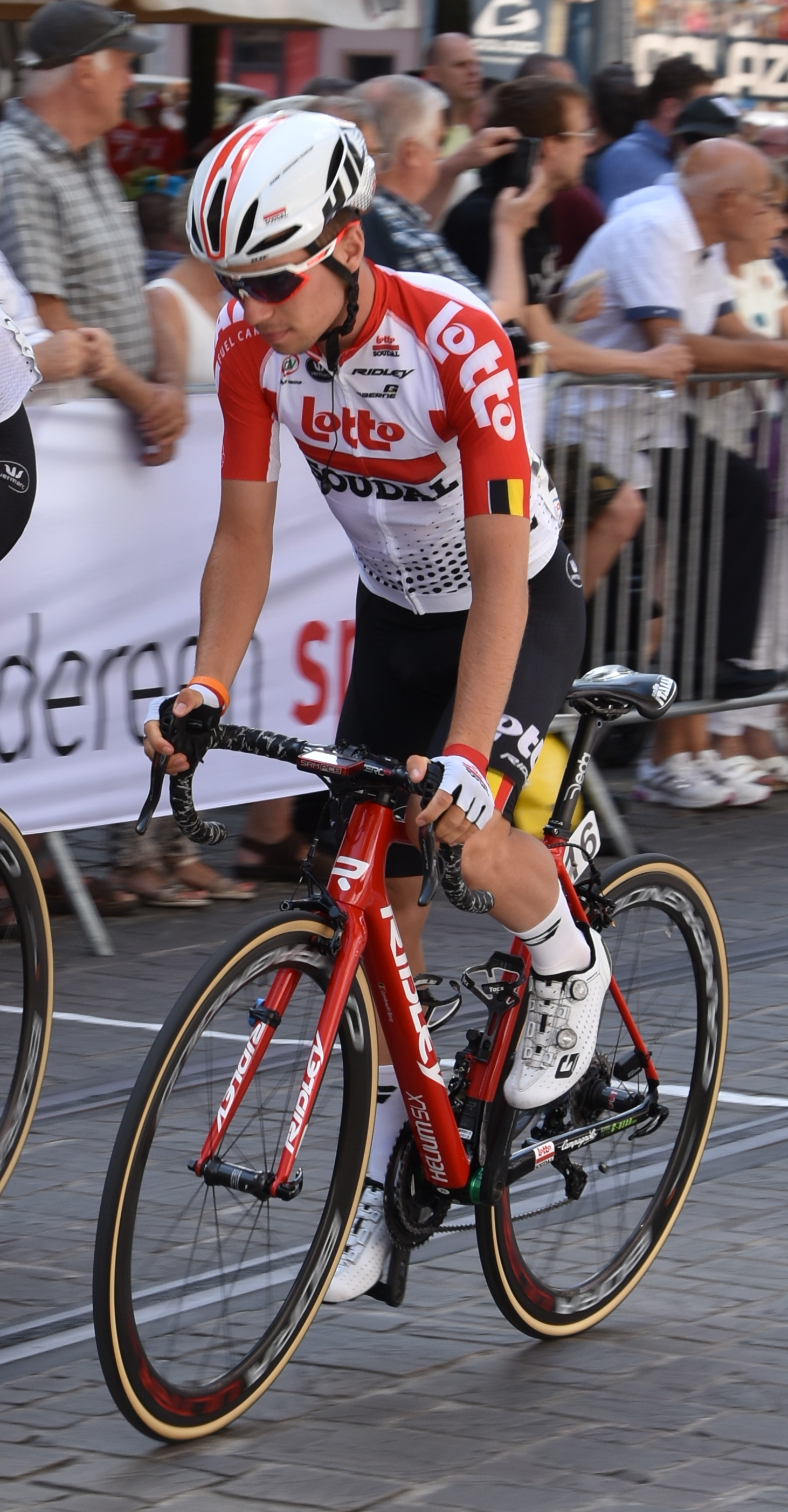 Bjorg Lambrecht Belgisch kampioenschap Gent 30-06-2019